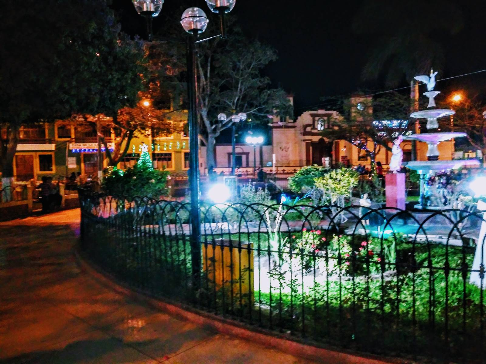 Plaza de armas de Paiján tomado en la noche.